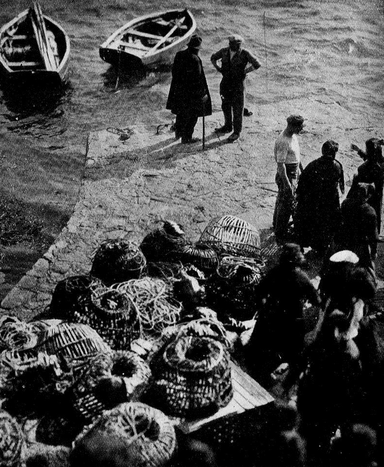 Homardiers de Molène en 1925 (photo tirée du film de Jean Epstein et publiée dans la revue "Lecture pour tous") en août 1929